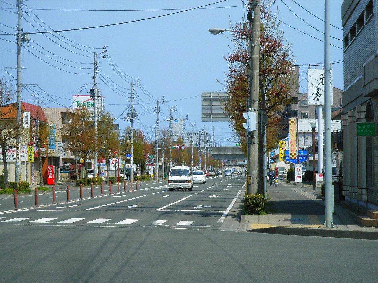 Miyagi Prefectural Road 39, Sendai-iwanuma Line. Sendai, Miyagi prefecture, Japan.